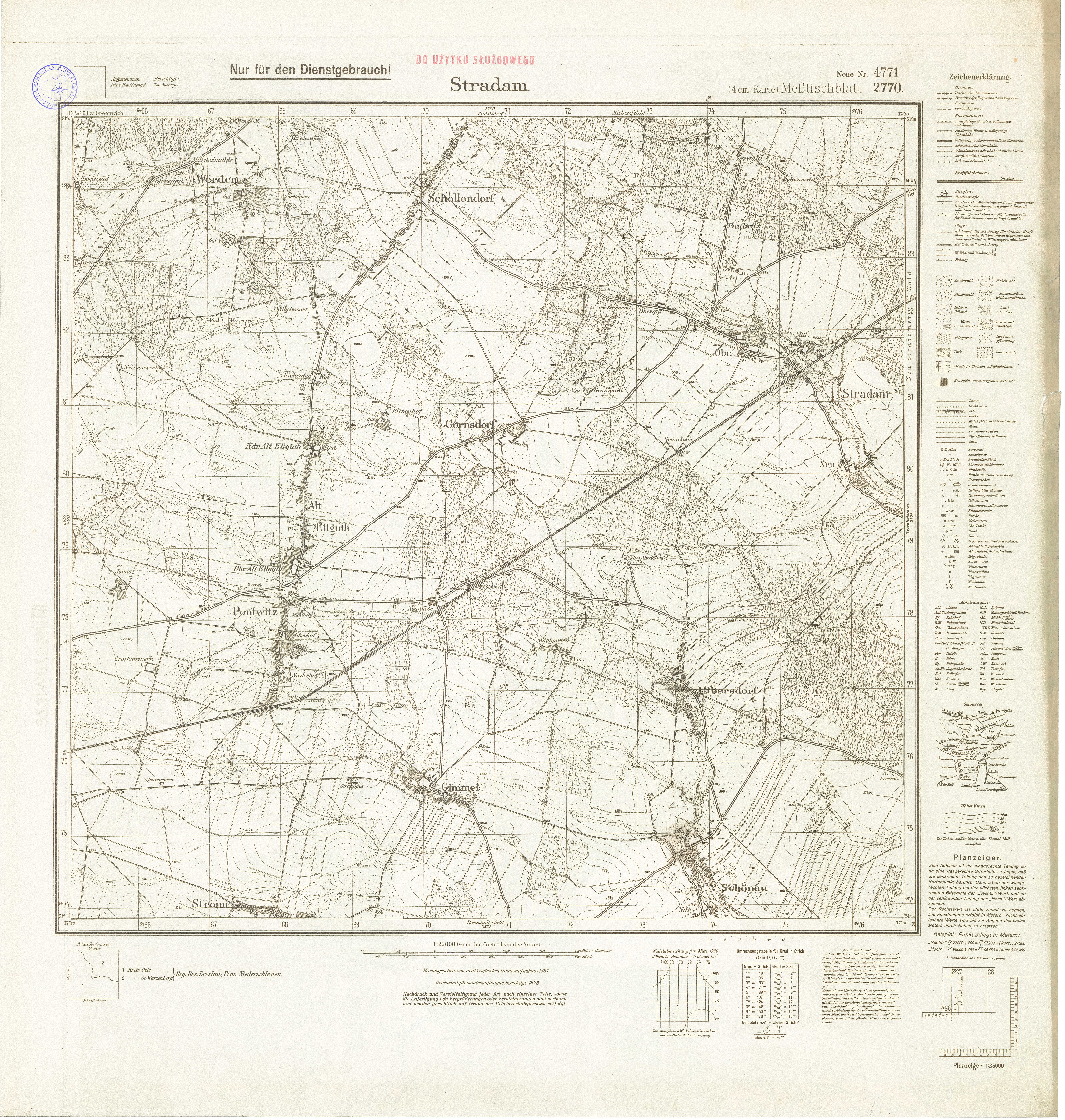 Niemiecka mapa topograficzna Messtischblatt nr 4771 (Stradomia Wierzchnia) z 1938 r. Skala 1:25000.